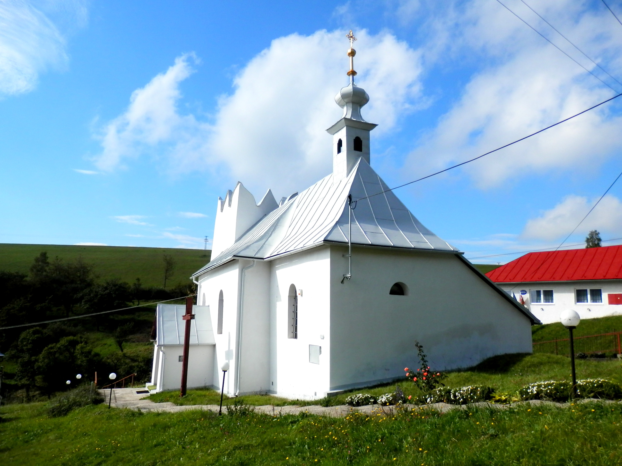 Renesančný kostol svätého Michala z druhej polovice 13.storočia. Obec Harakovce, okres Levoča.